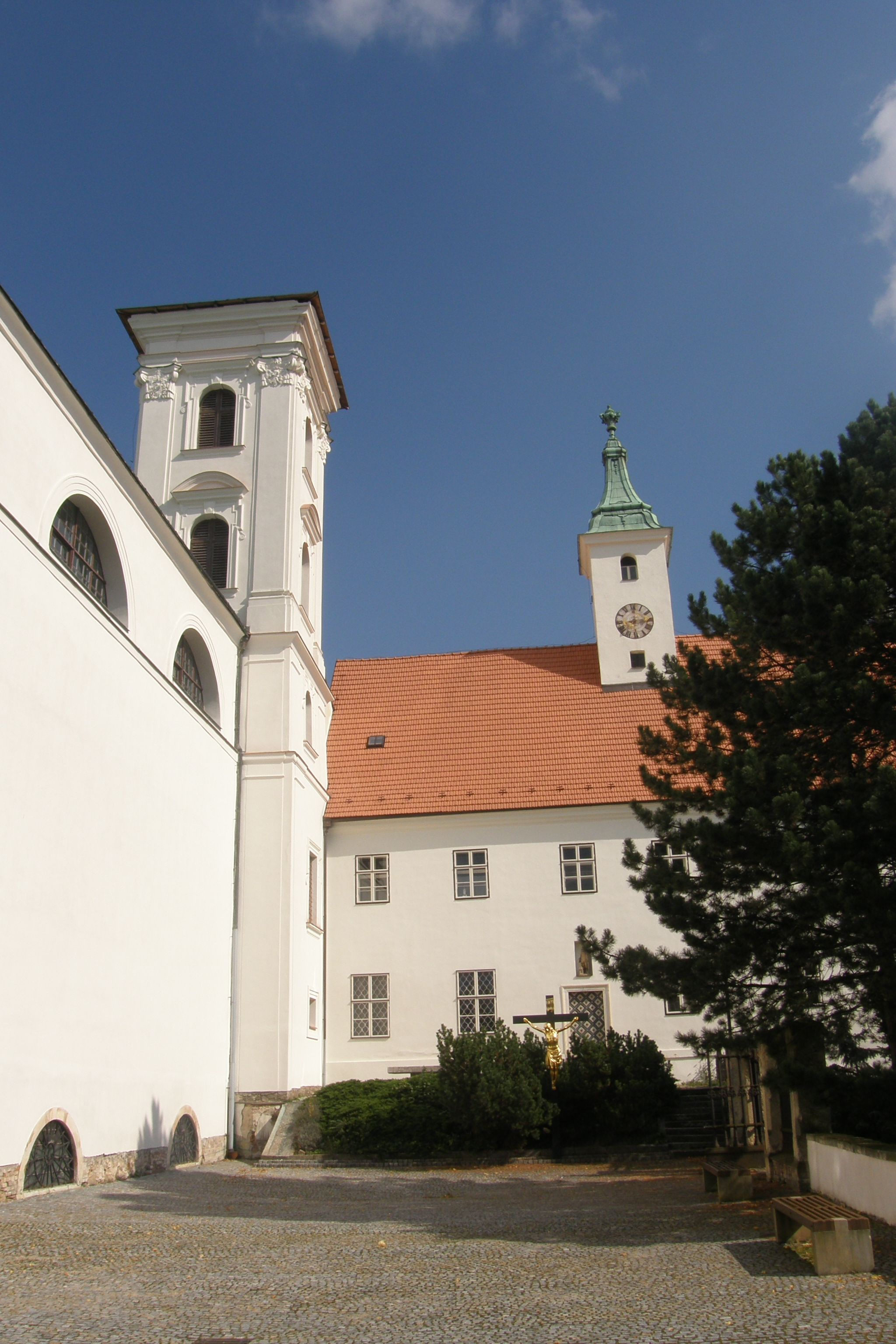 klášter paulánů (Vranov), Vranov 6